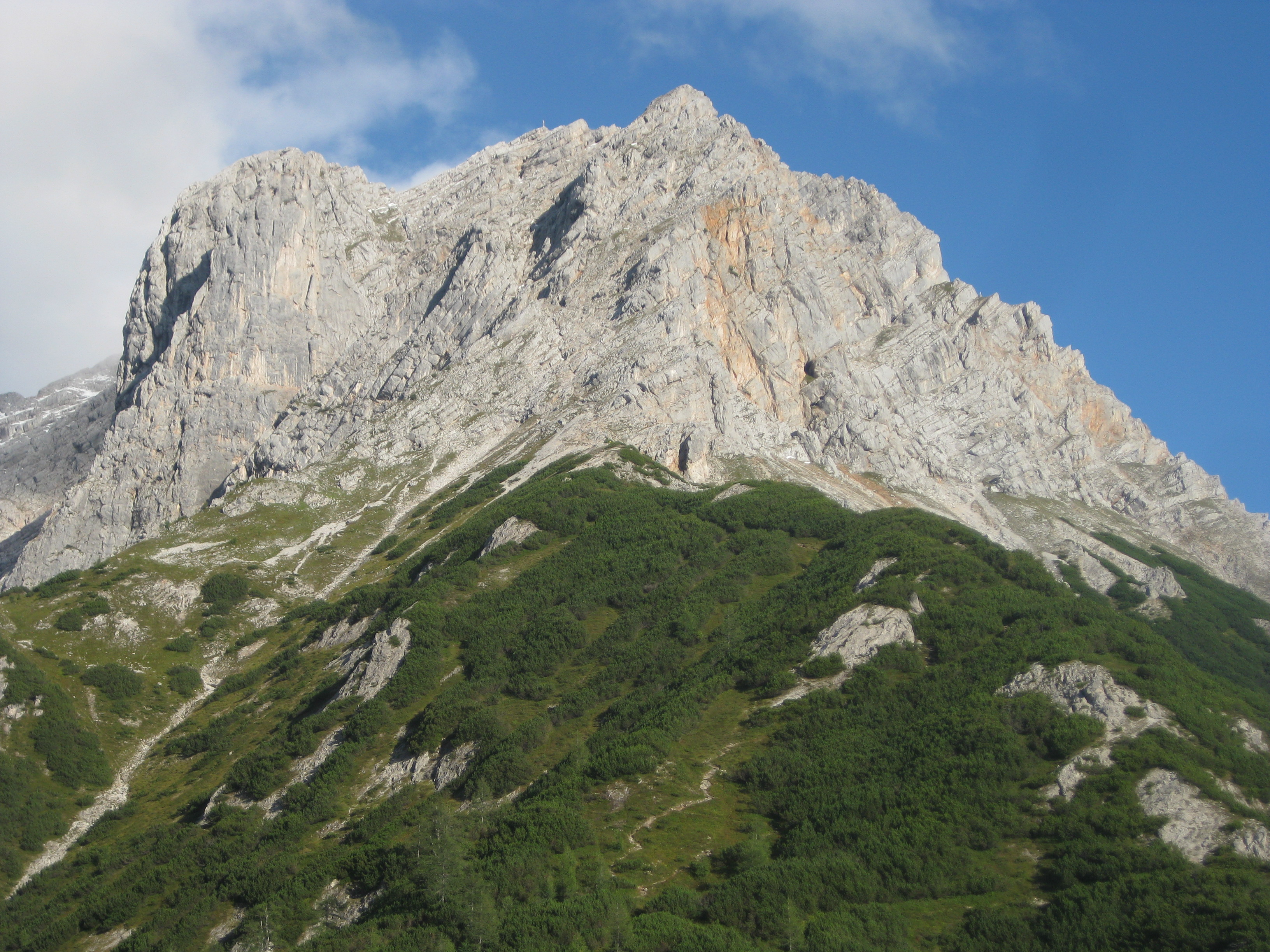 Persailhorn (Berchtesgadener Alpen) von der Peter-Wiechenthaler-Hütte gesehen.